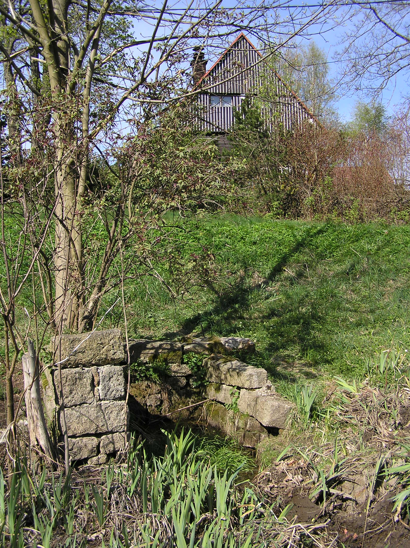 Pramen Lučního potoka v Milířích (Rádlo)